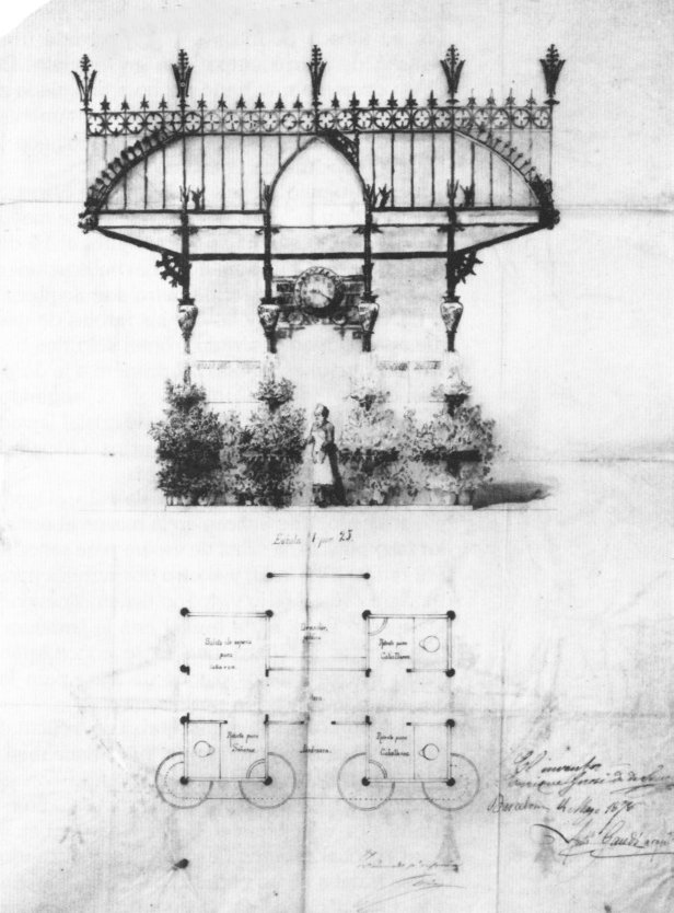 Proyecto de Kiosco Girossi, de Antoni Gaudí (1878)